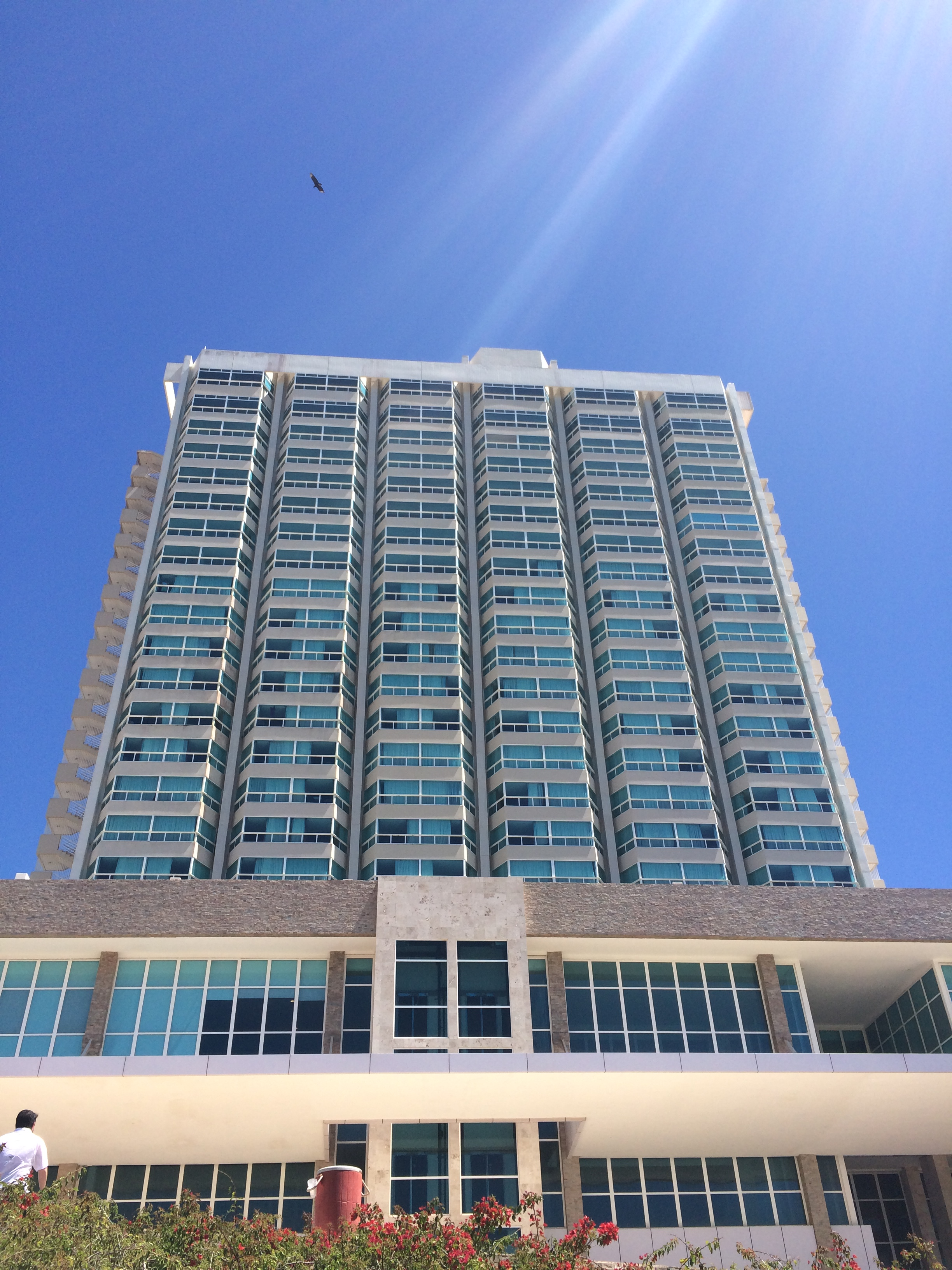 Hotel en la Avenida Raul Leoni Sector El Morro, Porlamar, Isla de Margarita, Nueva Esparta, Venezuela 9